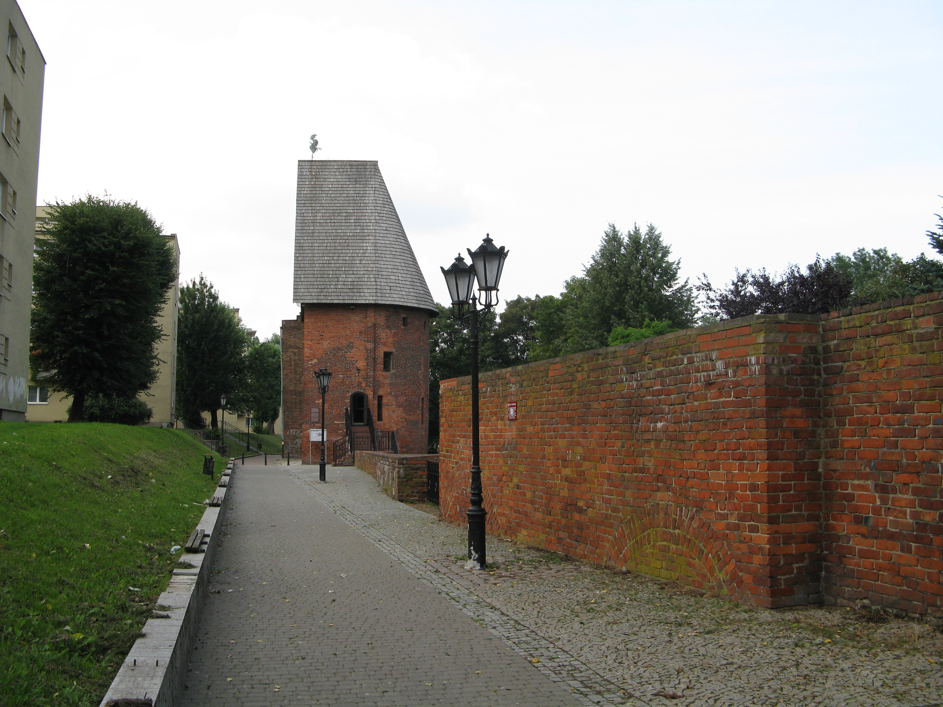 zespół murów miejskich wraz z Basztą Czarownic i Bramą Młyńską ul Grodzka, Jagiełły, Fr. Nullo, Zamkowa, Słupsk